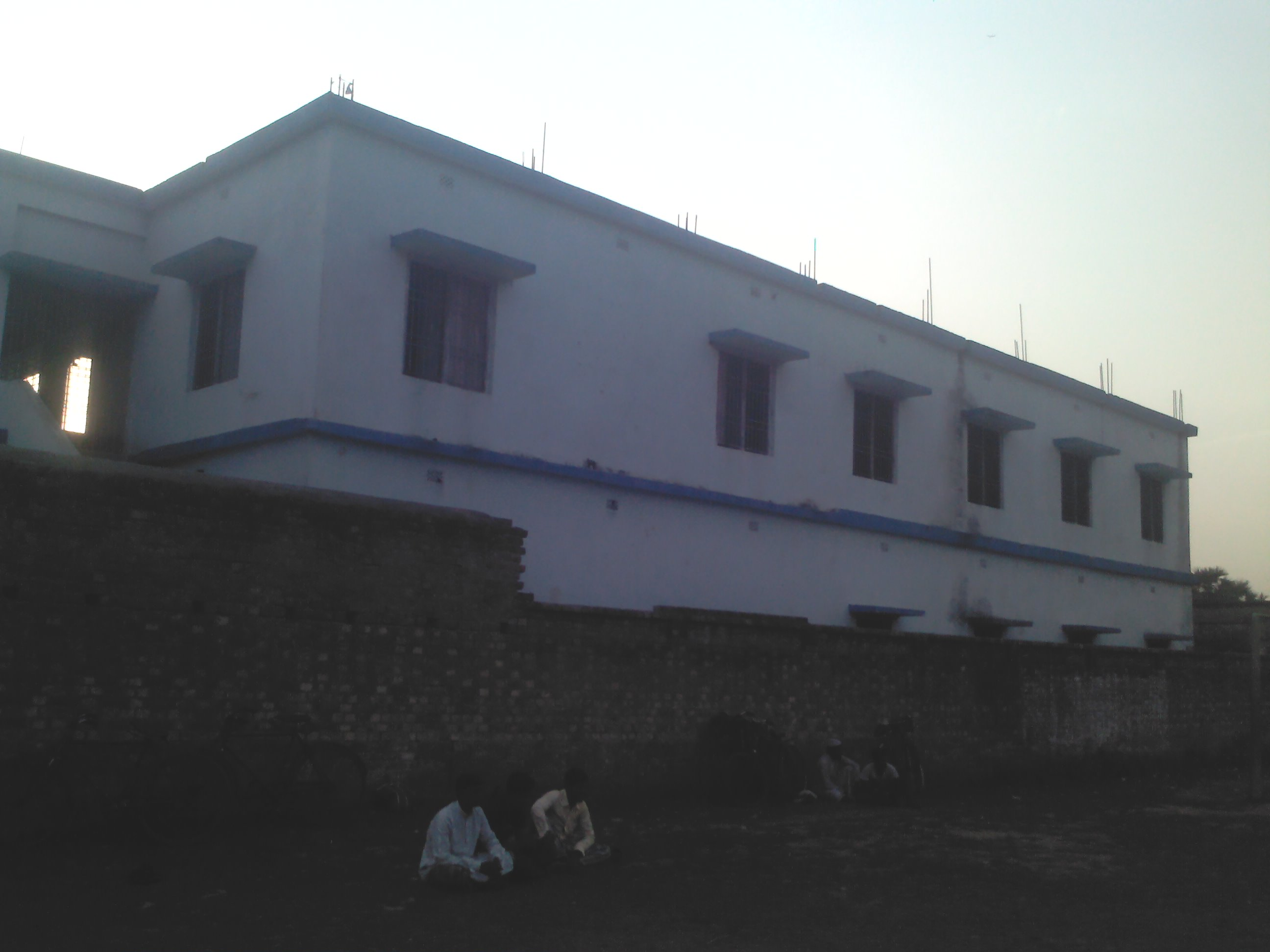 Jhuruli Adarsha Vidyapith.